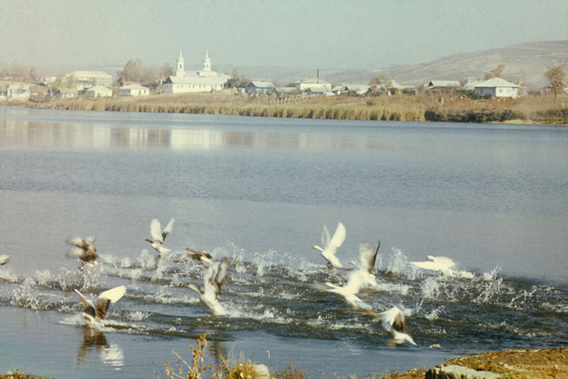 Hancesti district.